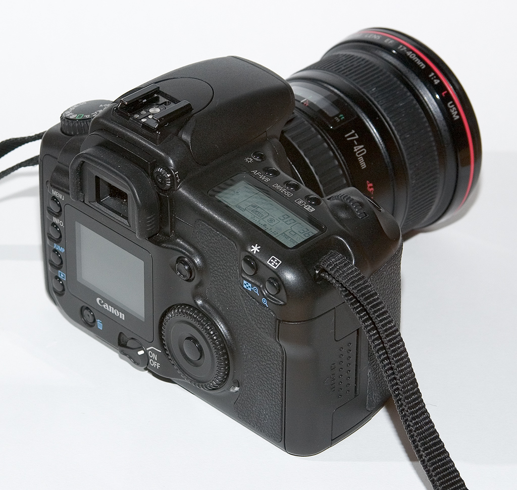 Canon EOS 20D Kamera